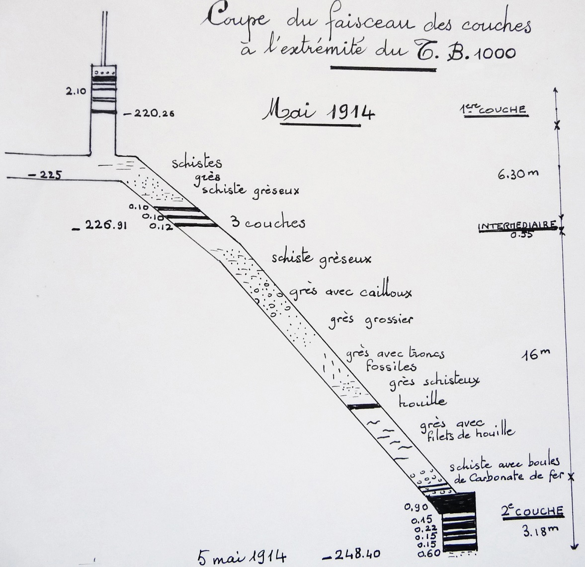 Étage 1000 du puits Arthur de Buyer en 1914.